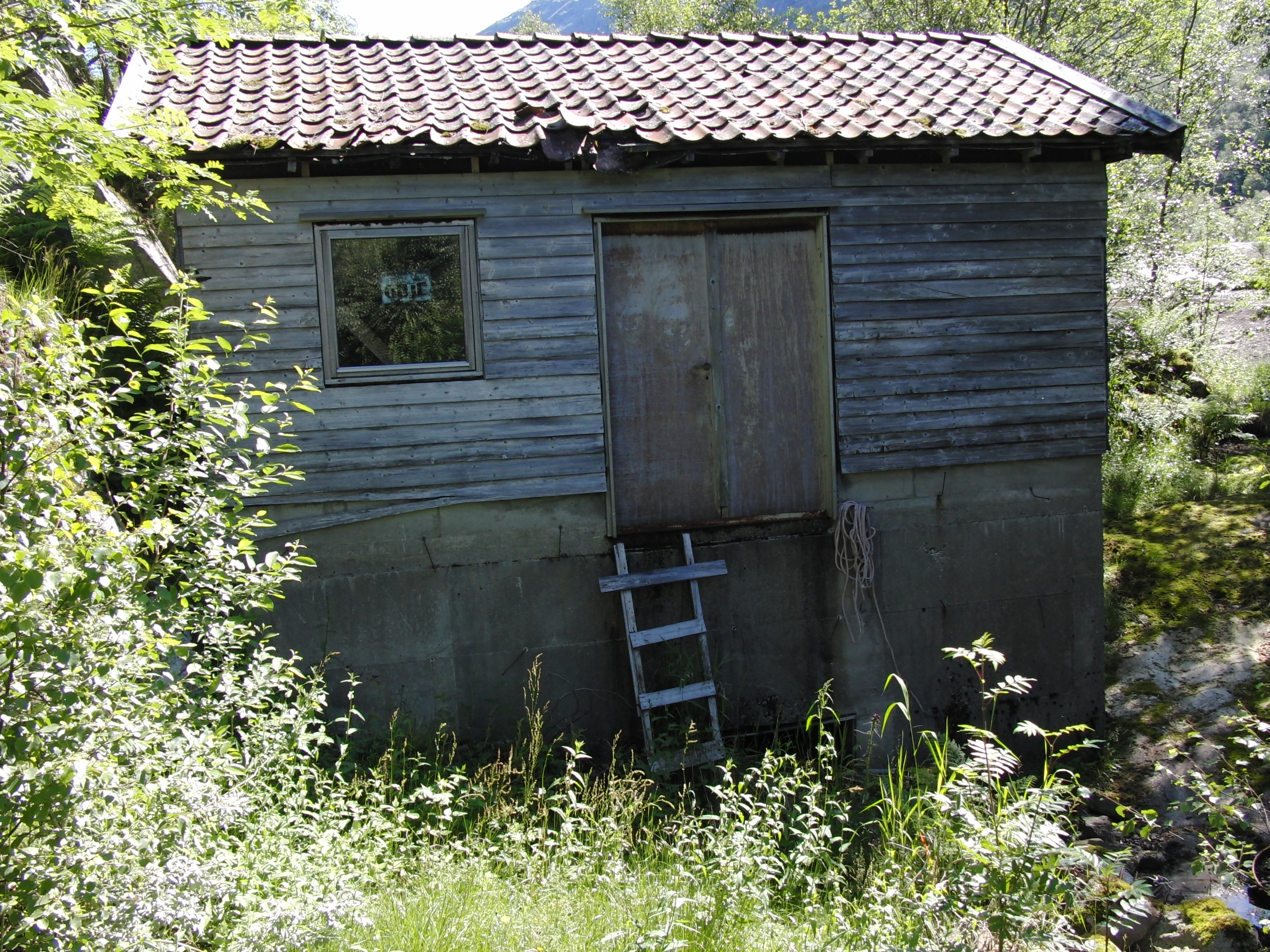 Mjåland kraftverk